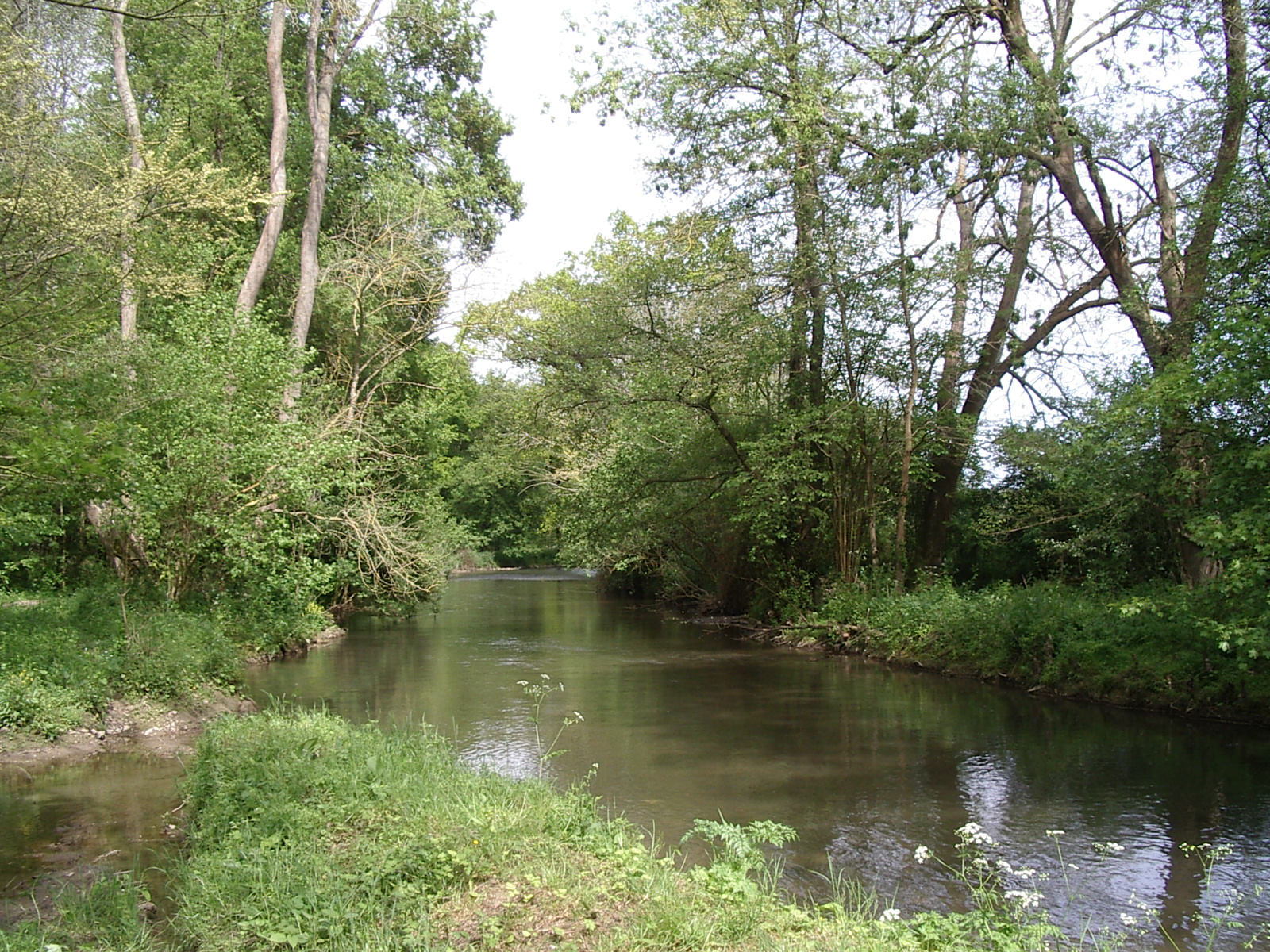 La Risle sur le territoire d'Ajou (France, Eure)